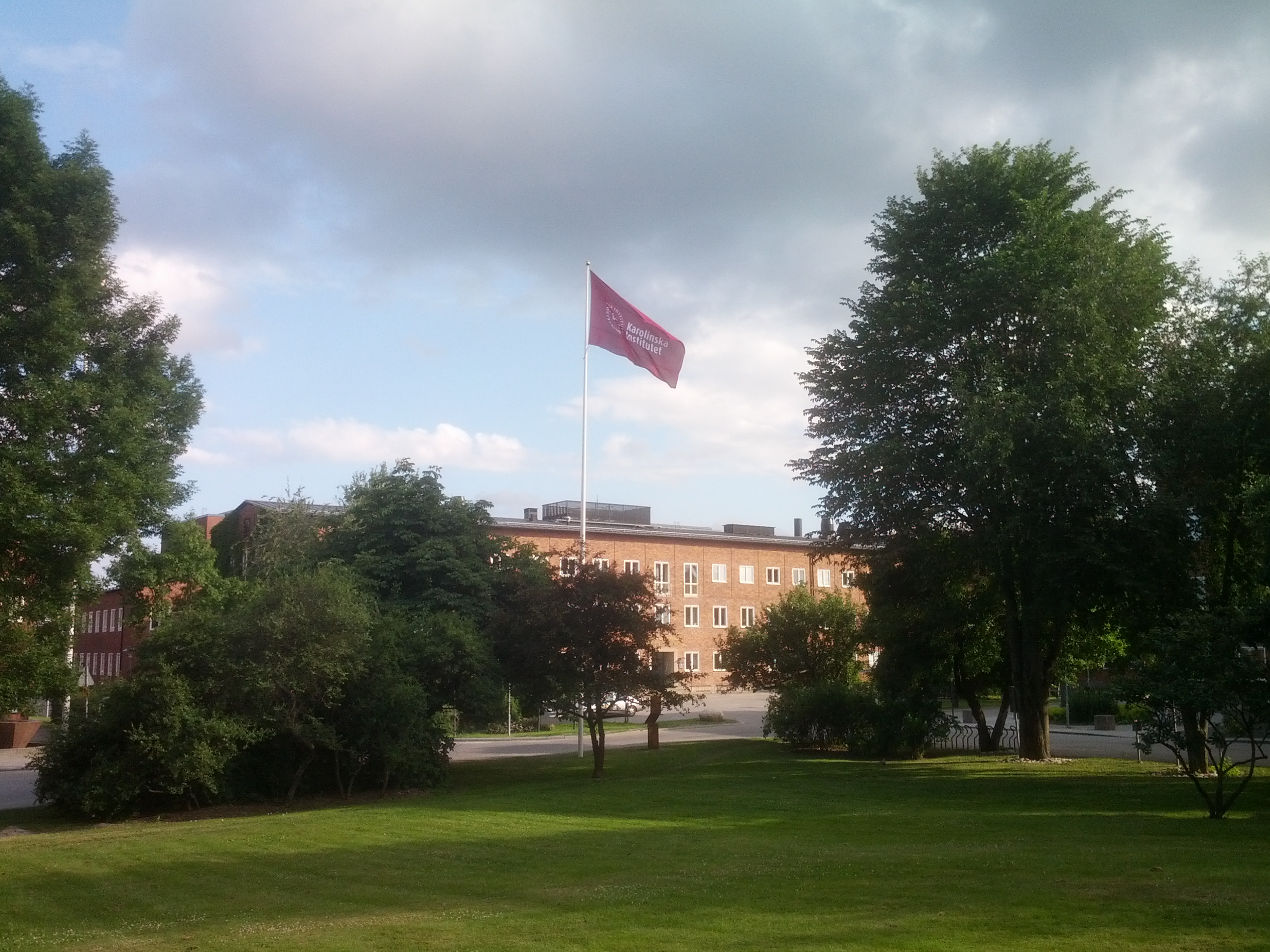 Karolinska institutet.